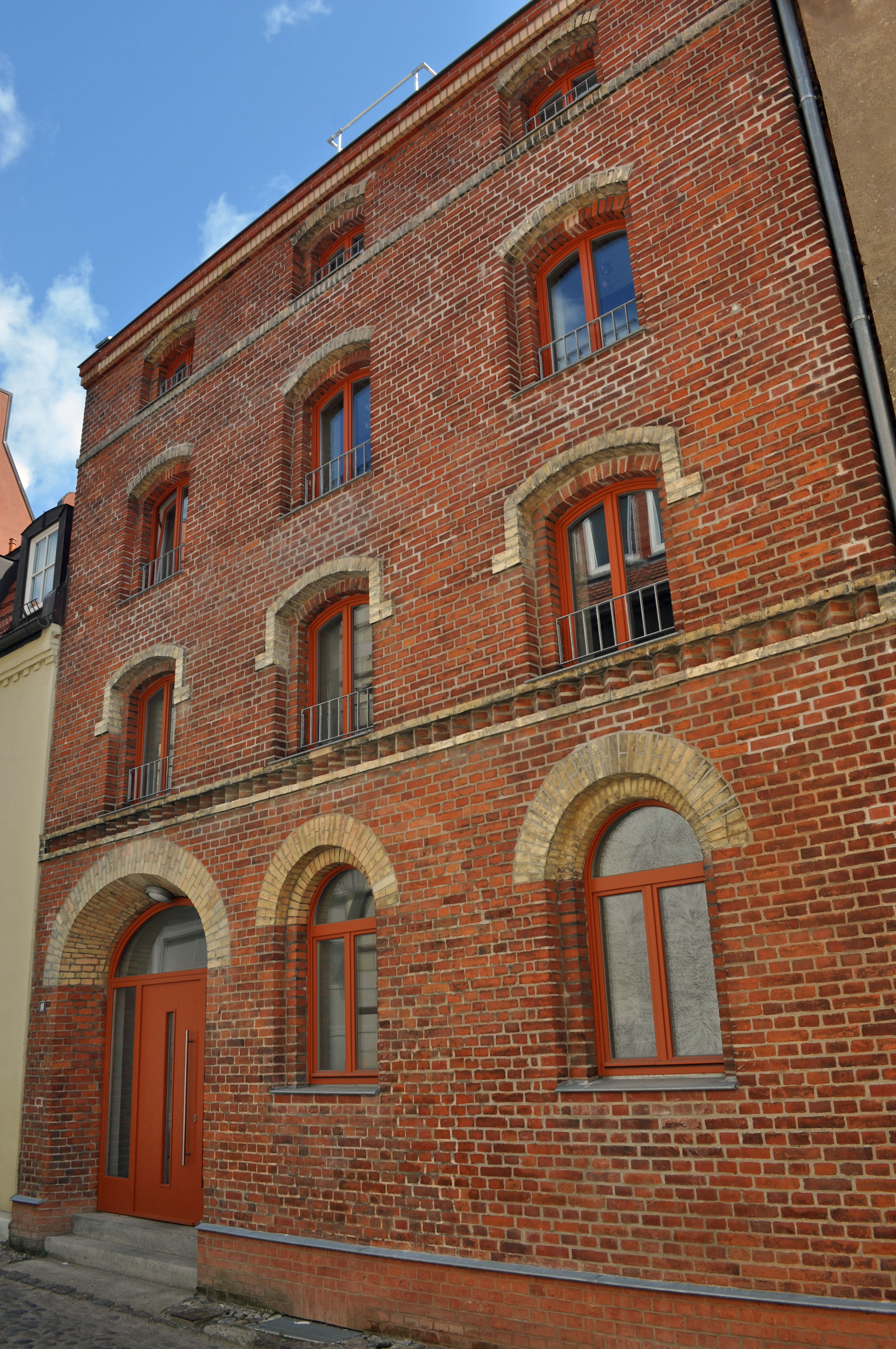 Gebäude in Stralsund, siehe Dateiname